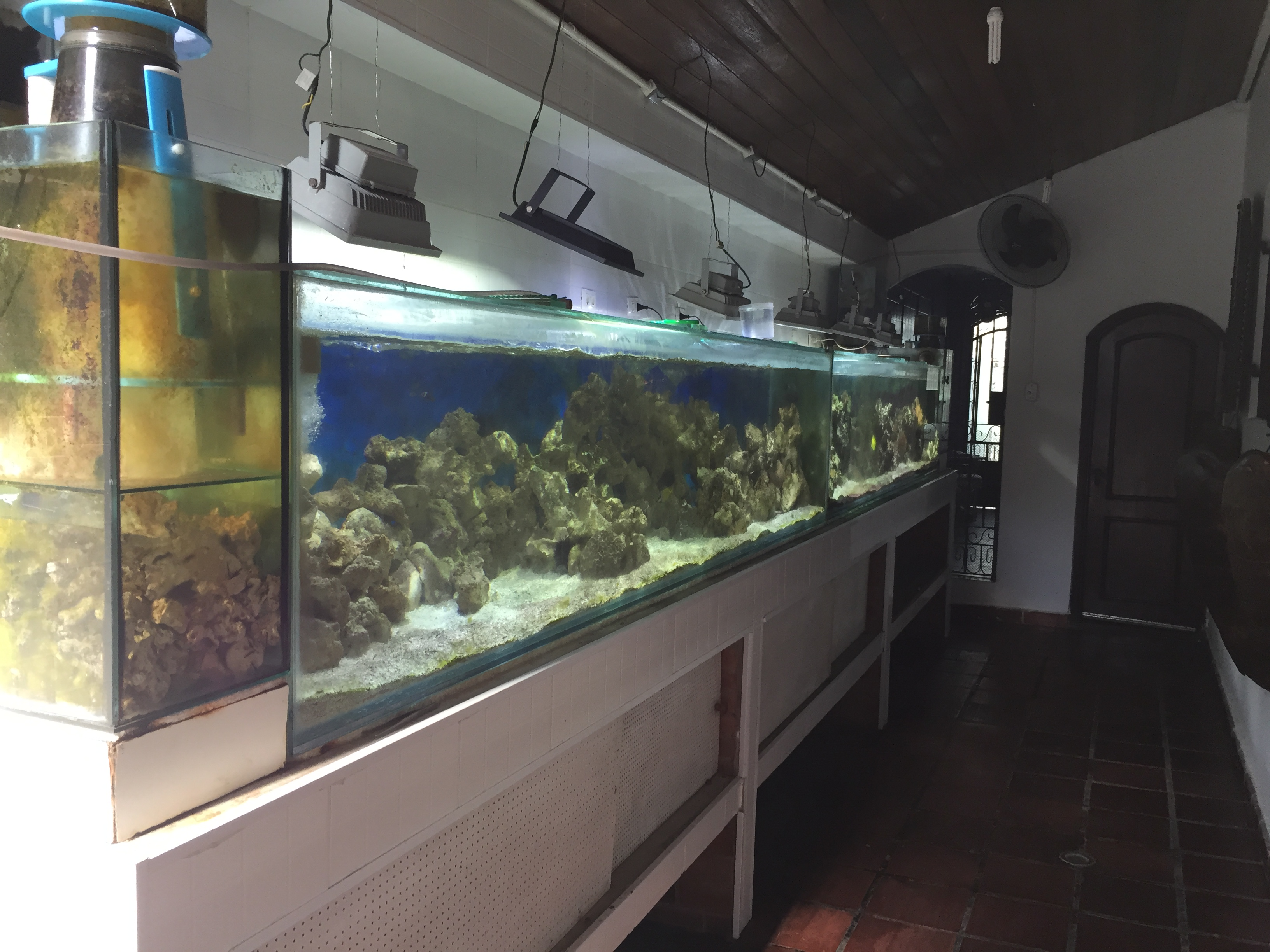 Vista do aquário do Museu do Mar (Santos)